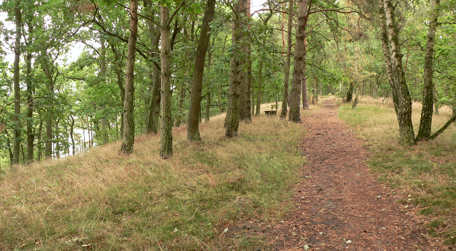 Wanderweg oberhalb der Elbe im Höhbeck